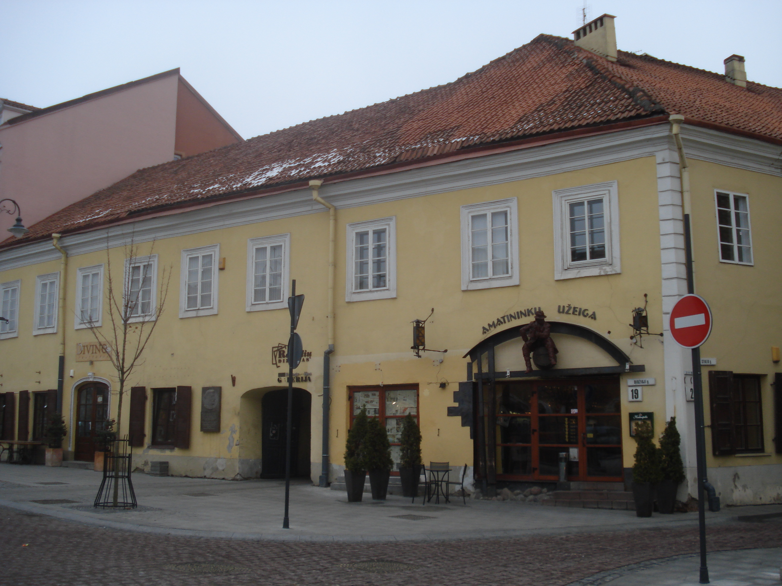 Amatininkų užeiga. Didžioji g. 19 / Stiklių g. 2